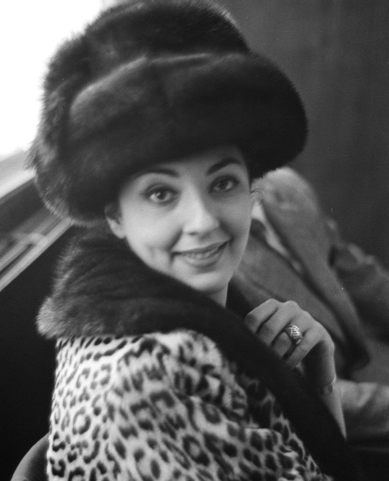 Italiaans Operagezelschap in Amsterdam. Anna Moffo tijdens persconferentie.